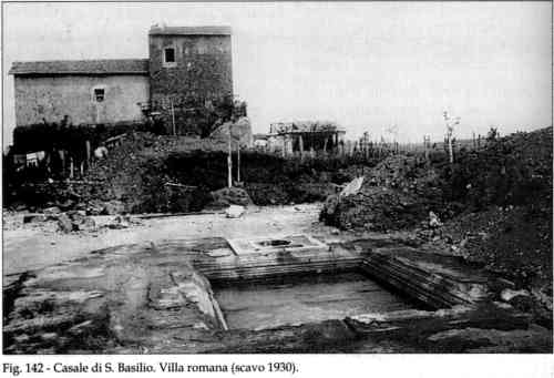 Il Casale di San Basilio: Sito archeologico Villa Romana (scavo 1930)